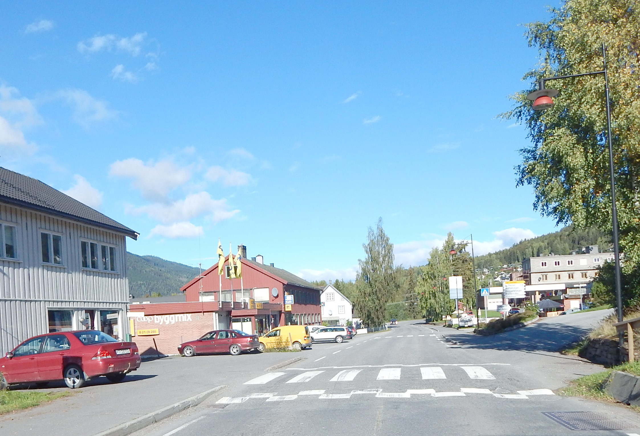 Fylkesvei 357 gjennom Tretten sentrum